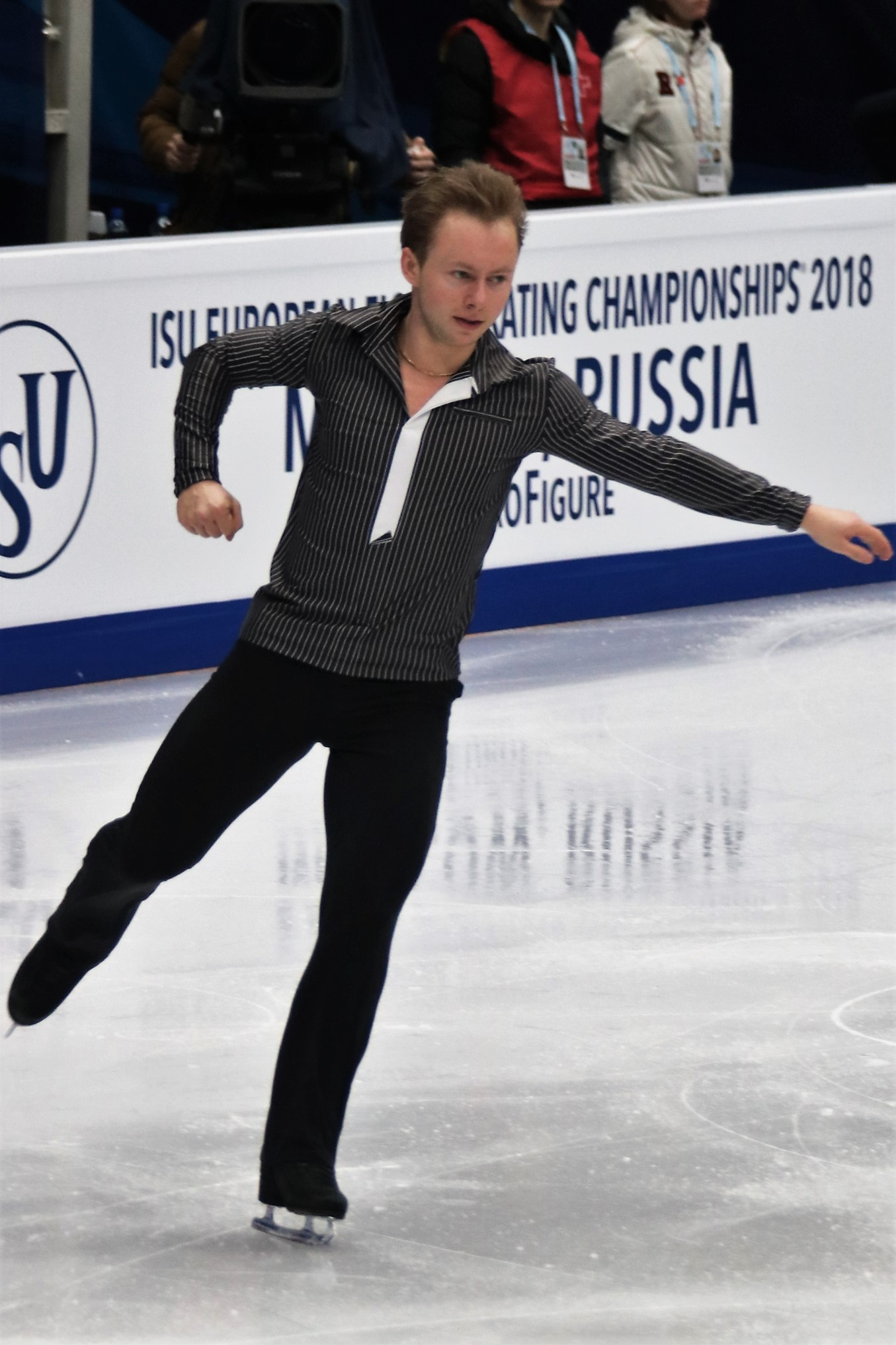 Александр Майоров (Швеция) на Чемпионате Европы по фигурному катанию 2018.